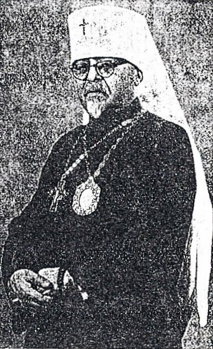 Wizerunek Iwana Ohijenko